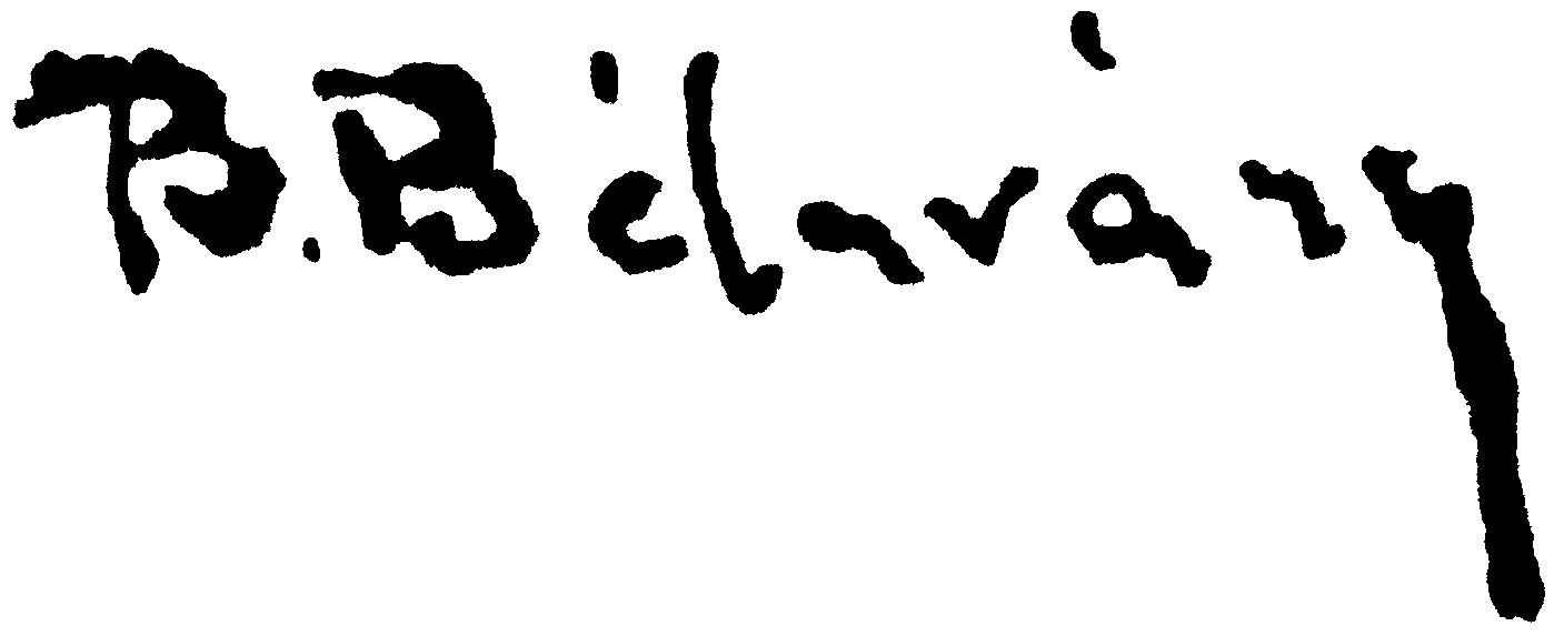 Signature du peintre hongrois Burchard Bélaváry István (1864-1933).